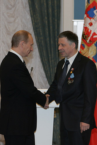 МОСКВА, КРЕМЛЬ. Вручение государственных наград. Звание Героя России присвоено пилоту глубоководного обитаемого аппарата «Мир-2», участнику высокоширотной арктической глубоководной экспедиции «Арктика-2007» Евгению Черняеву.